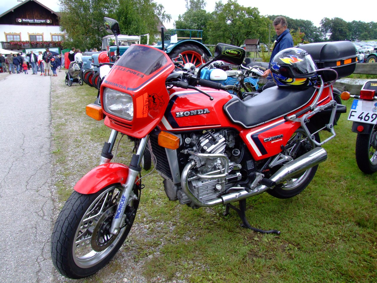 Quelle: selbst fotografiert, 08/2006 Fotograf: Späth Chr.